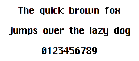 Beispiel der Schriftart Chicago die mittels eines frei erhältlichen Truetype Fonts erstellt wurde